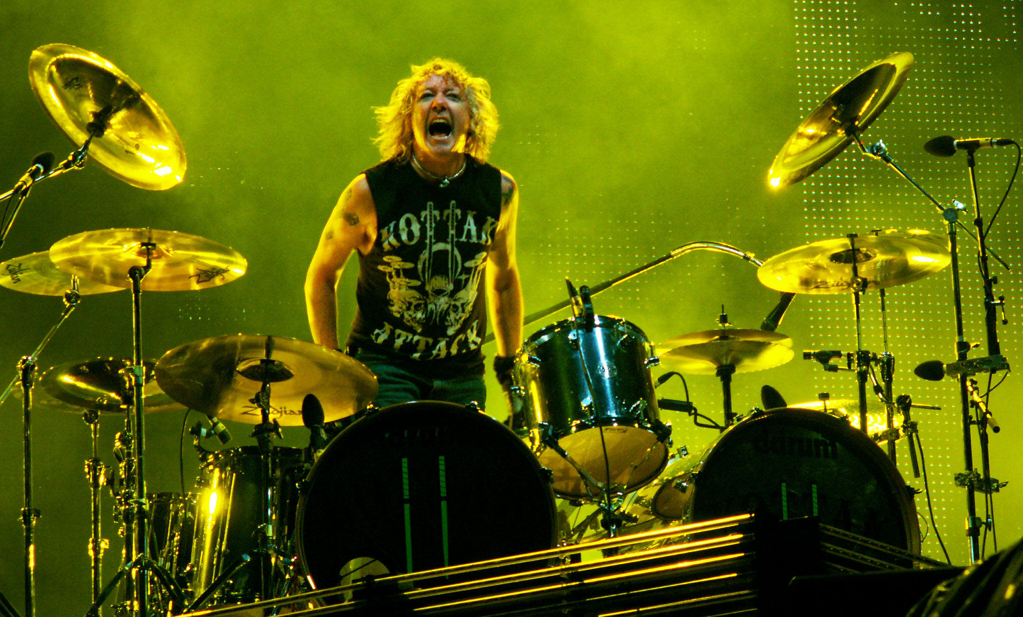 James Kottak au Hellfest 2011